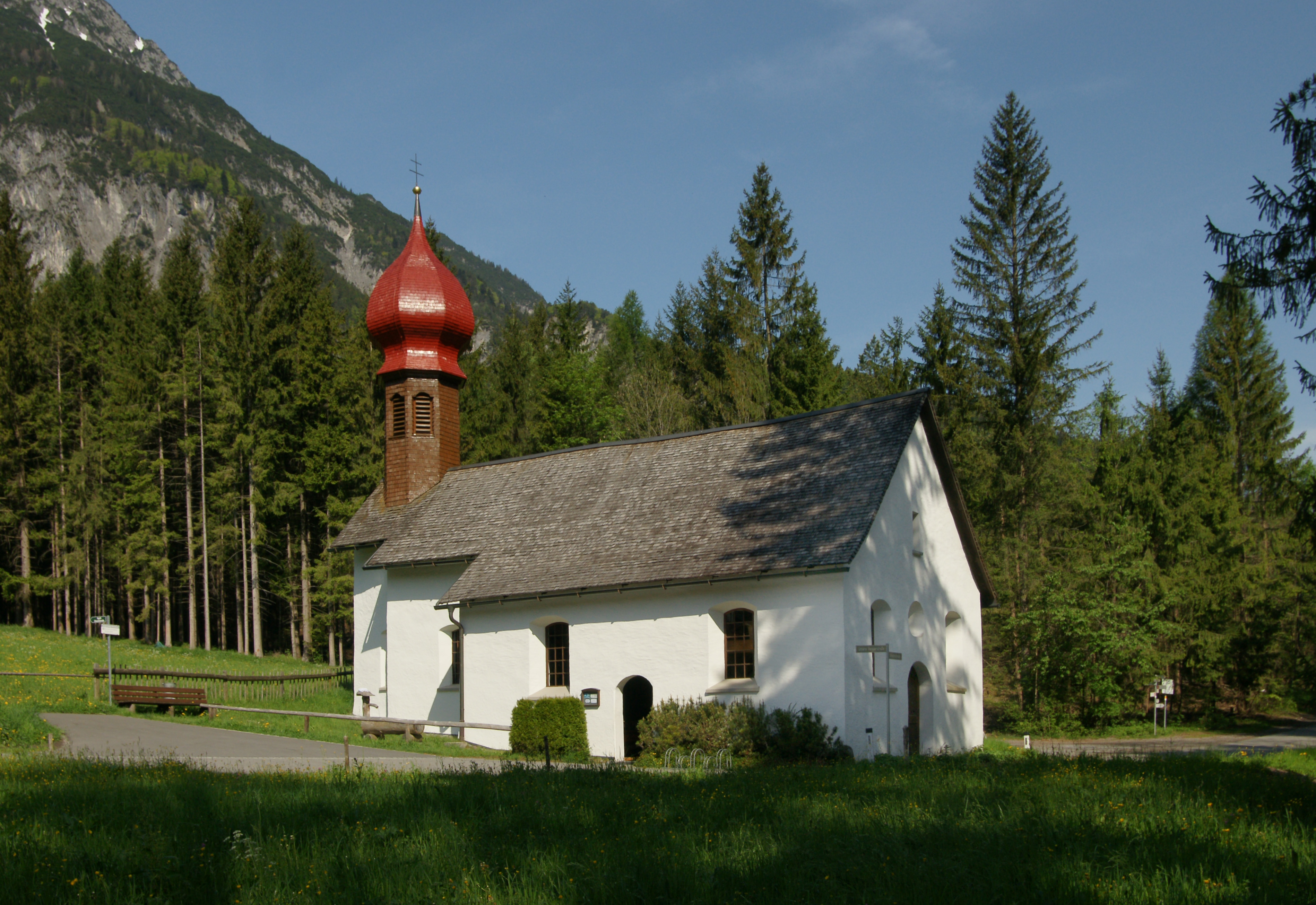 Die Wallfahrtskapelle Unsere Liebe Frau und Hl. Sebastian, auch Venser Bild genannt, ist eine römisch-katholische Kapelle im Ortsteil Vens in (Vandans im Montafon.